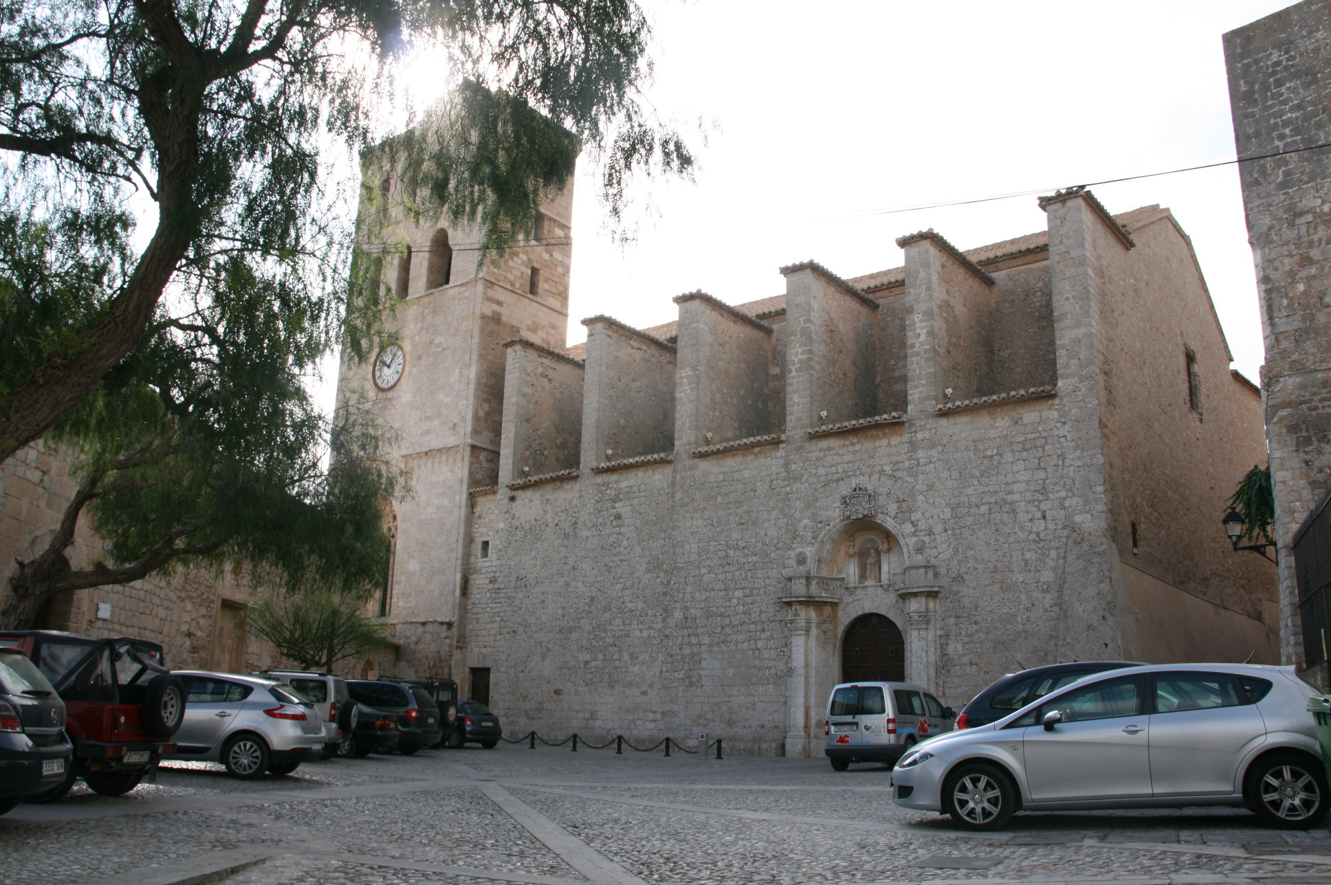 Exterior de la Catedral d'Eivissa